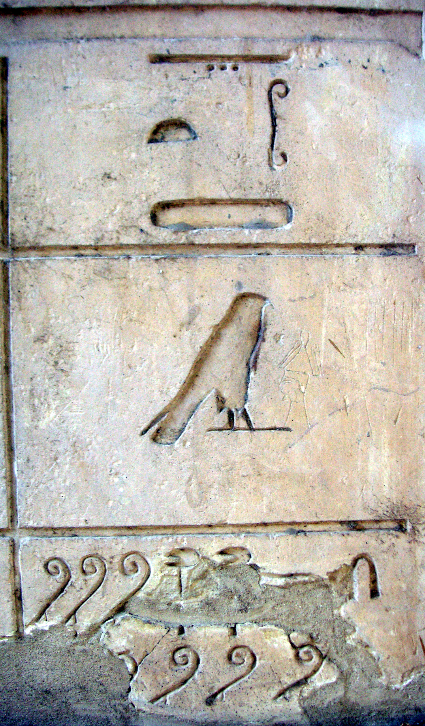 Nome 1 Upper Egypt